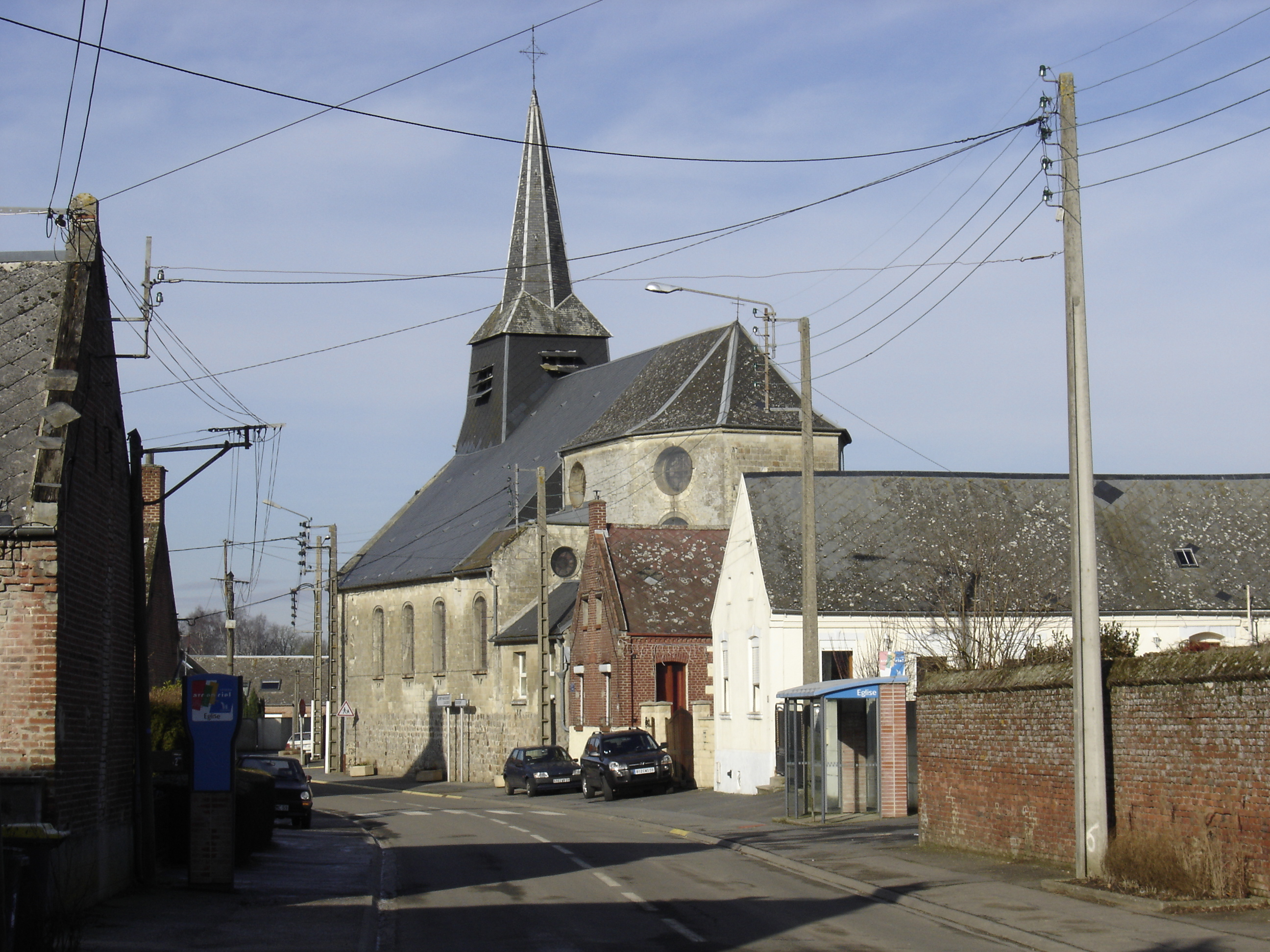 Eglise de Montigny-en-Cambrésis - Church of Montigny-en-Cambrésis